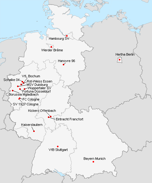 Répartition des clubs en 1.Bundsliga 1973-1974.